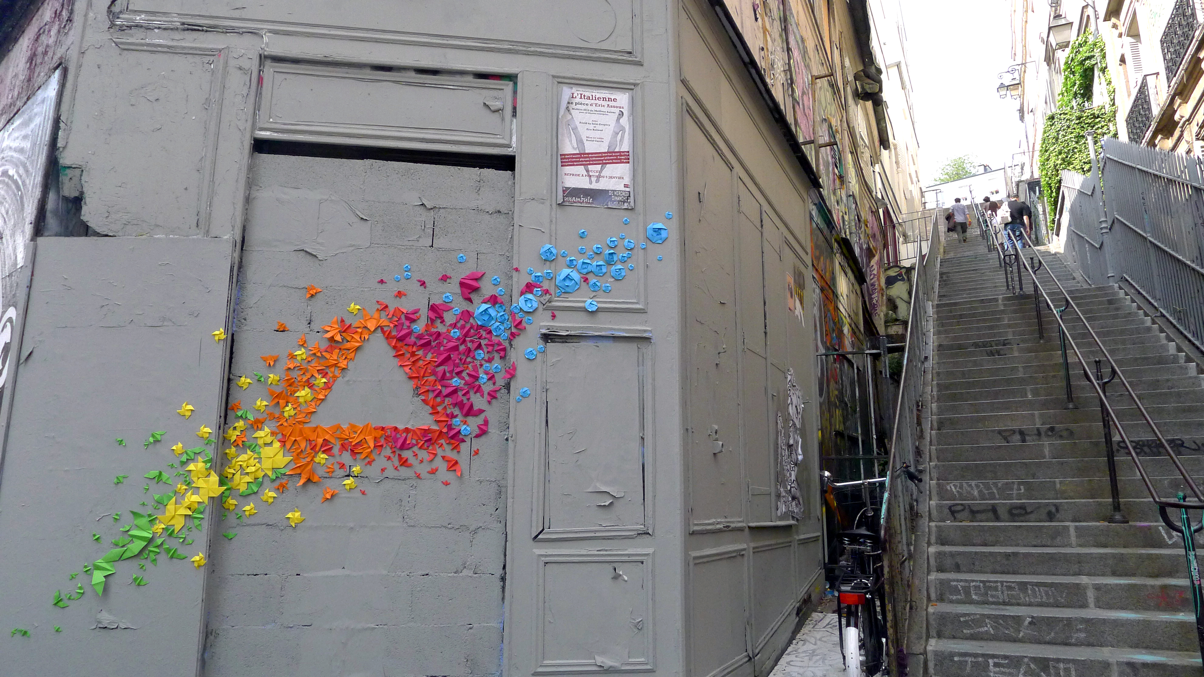 L'oeuvre "spectre" a été installée en 2012 dans les rues de Paris par l'artiste Mademoiselle Maurice